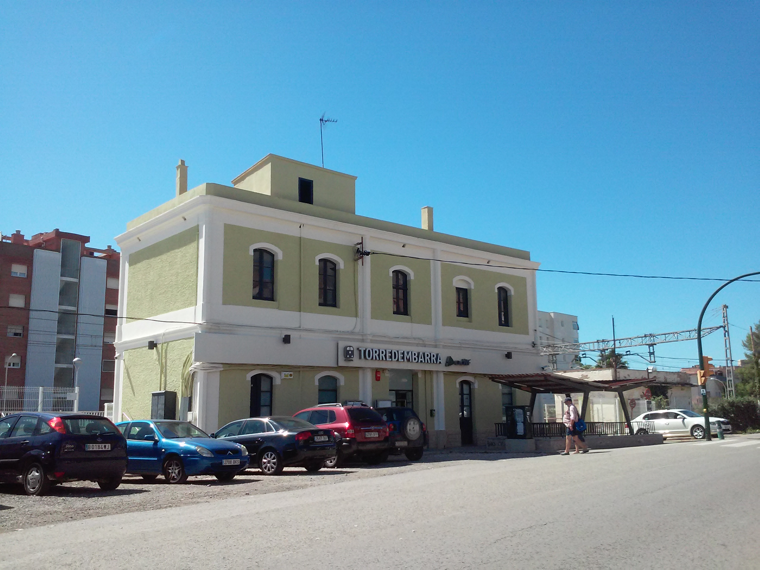 Estación de tren de Torredembarra, (provincia de Tarragona).